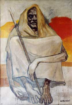 Carlo Ludovico Bompiani - Il Mendicante In qualità di erede del diritto d'autore dell'opera e di autore della fotografia, autorizzo la diffusione di questa immagine purché sia contestualmente citato il nome del pittore. Spino 20:42, Nov 16, 2004 (UTC) Categoria:Immagini d'arte italiana